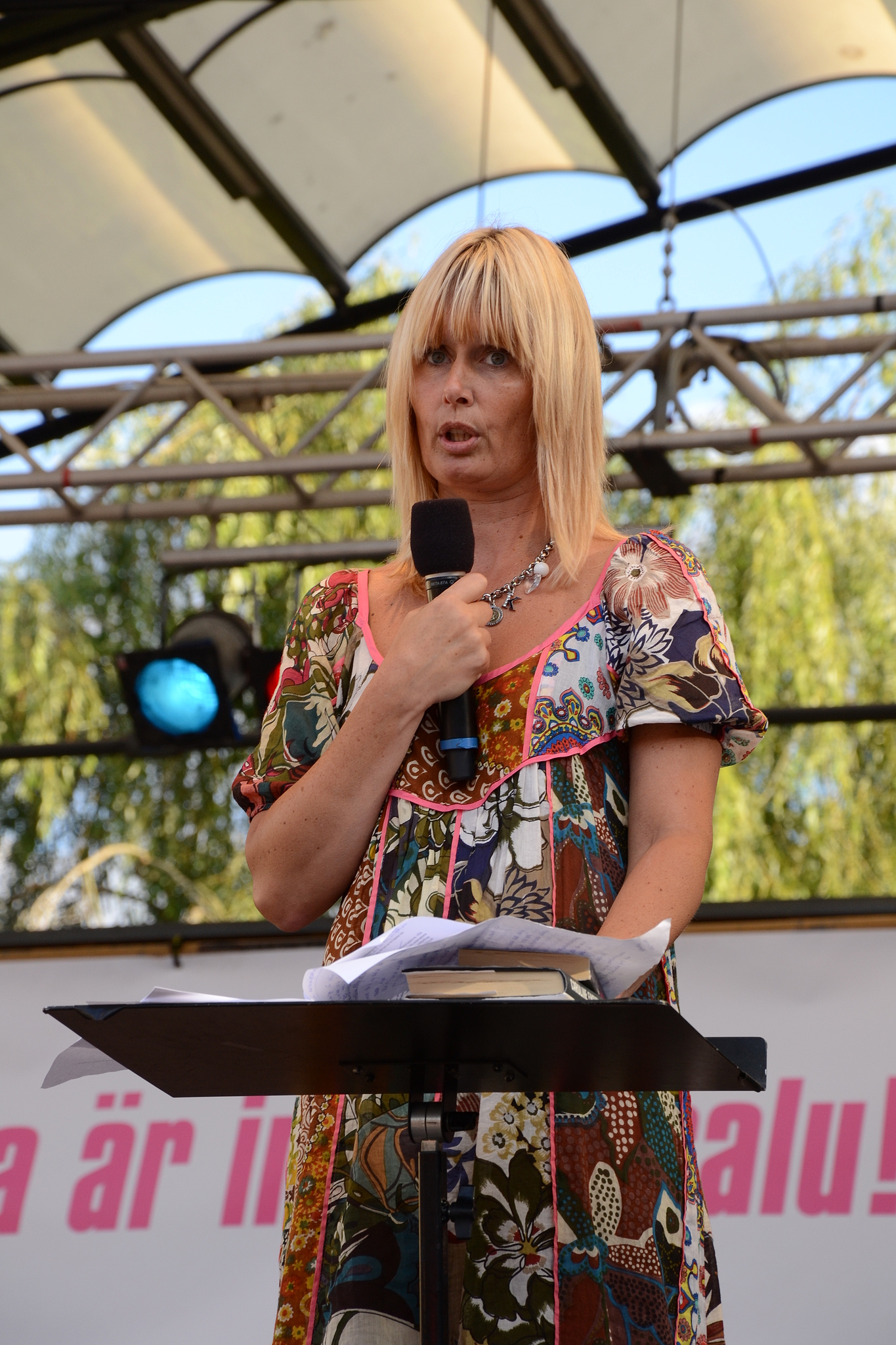 Från Barnrättsgalan 2011-08-23 i Kungsträdgården